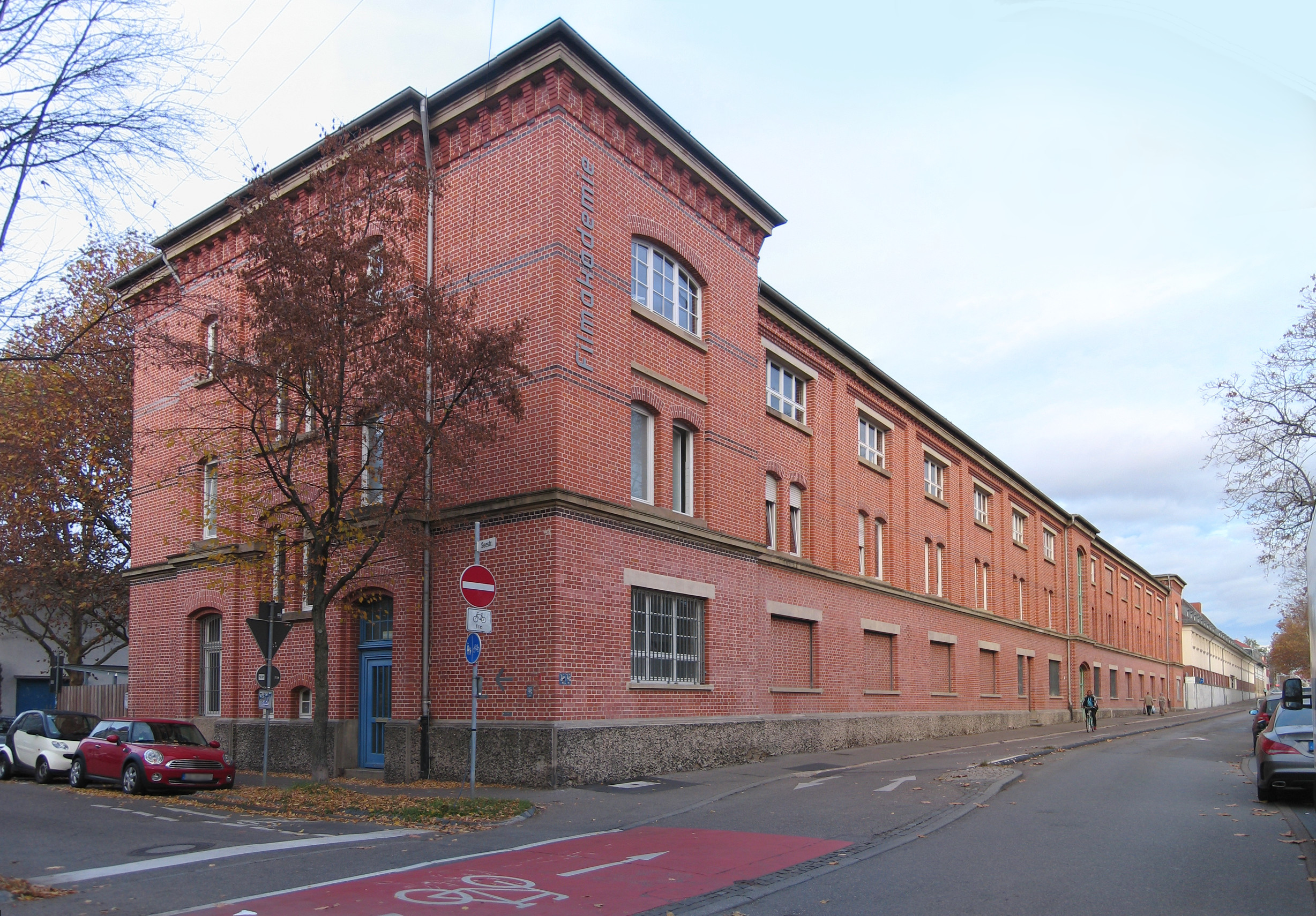 Filmakademie, Alleenstraße 25, Ludwigsburg